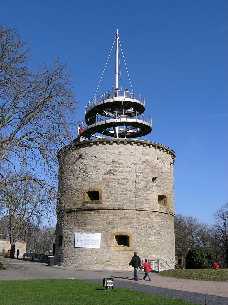 Turm A/Geschützturm II (errichtet 1530)